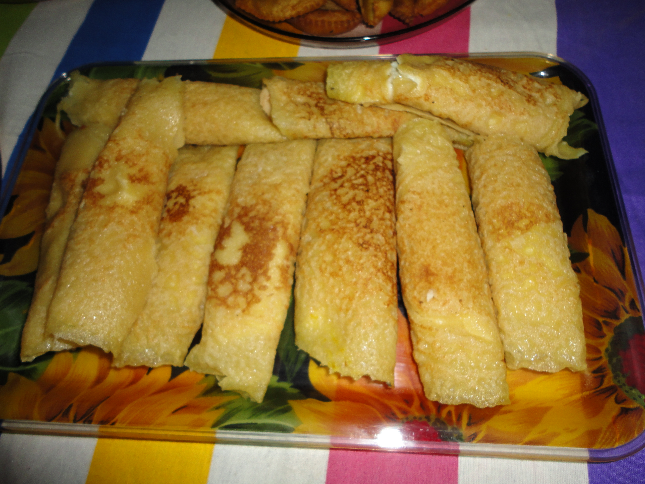 পাটিসাপ্টা পিঠা, বাংলাদেশের খাবার।